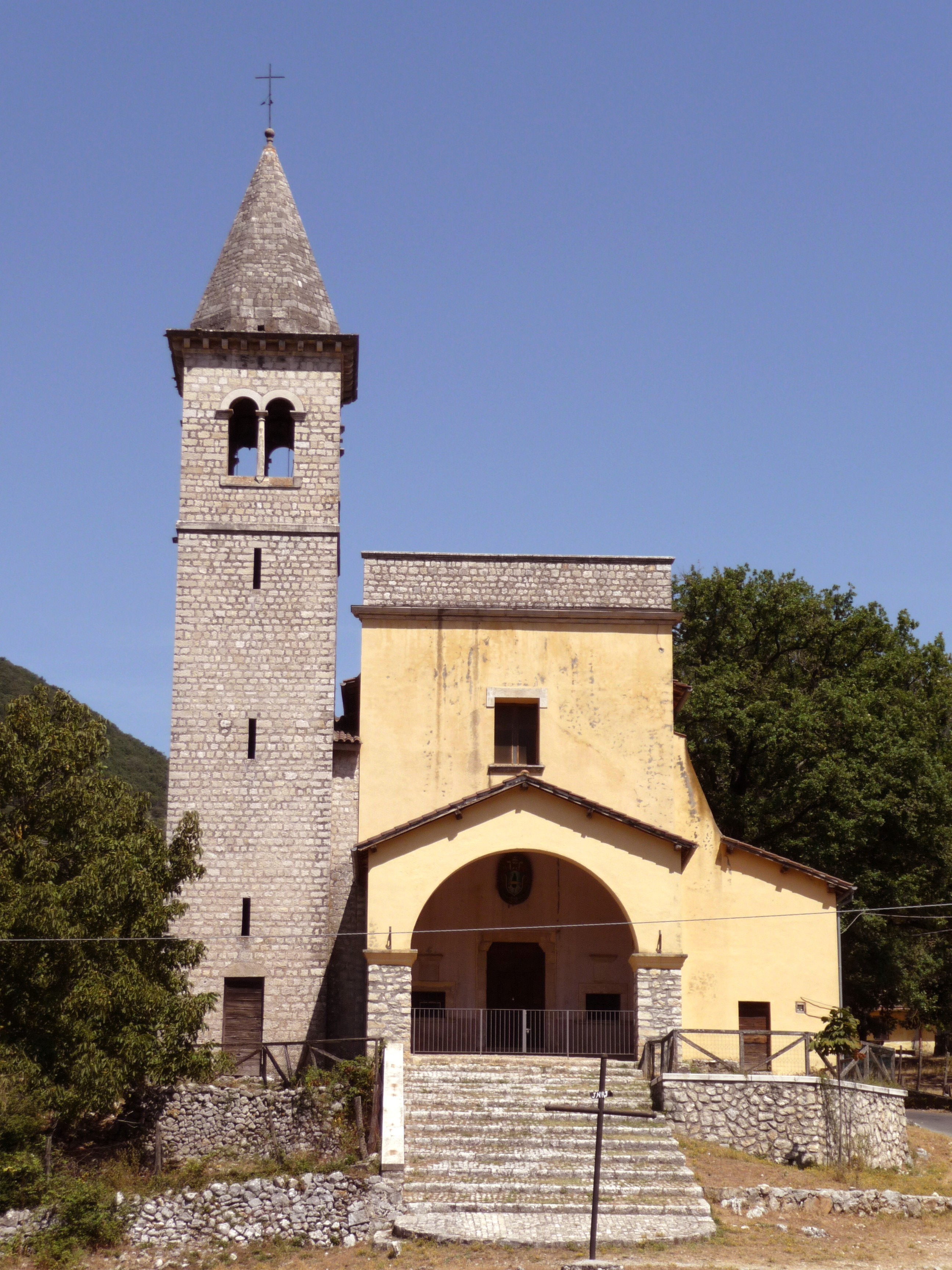 Chiesa SS Annunziata Carpineto